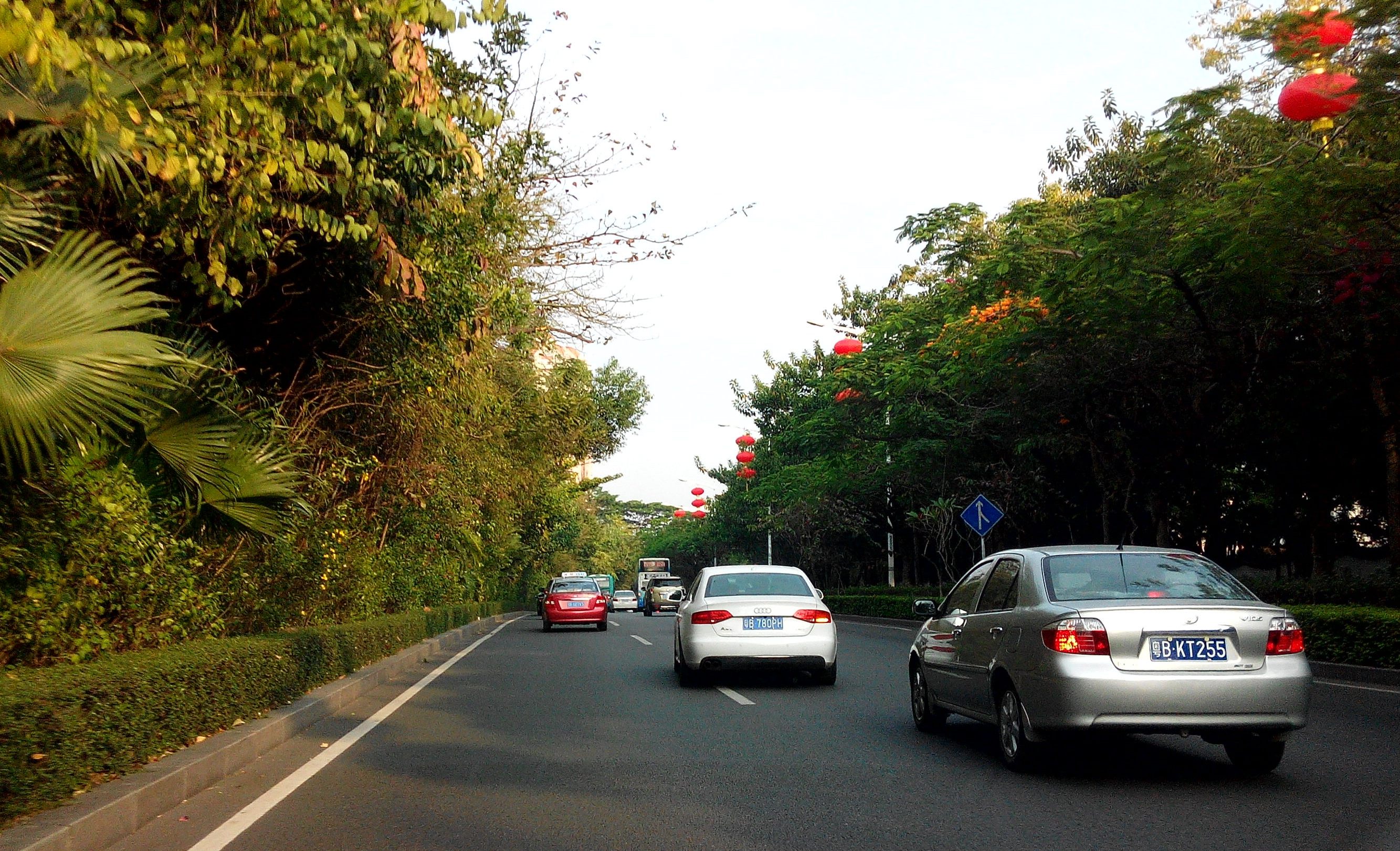 深圳深南大道华侨城段